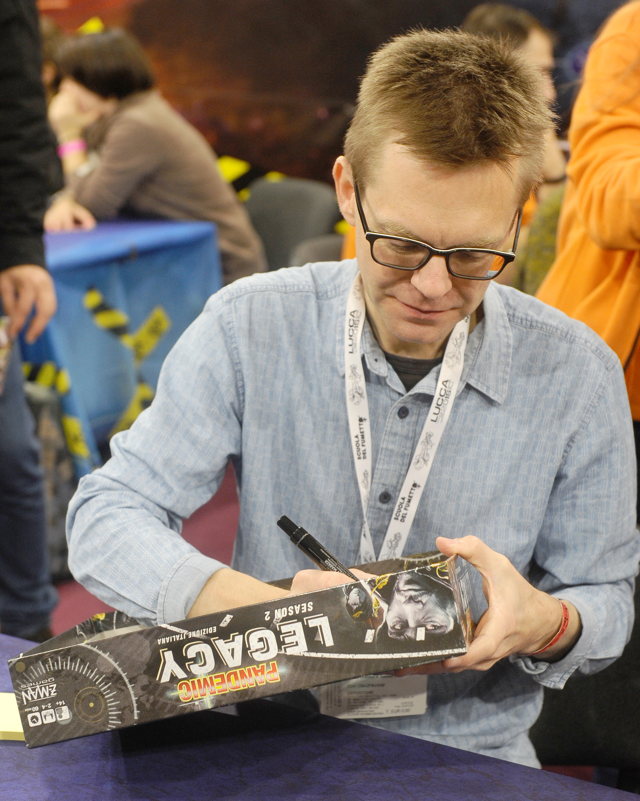 Matt Leacock autografa una copia di Pandemic Legacy: Season 2 a Lucca Comics & Games. Padiglione Carducci.